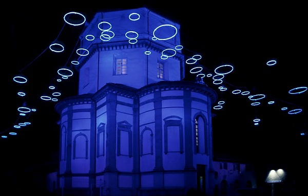 Monte dei Cappuccini near Torino, (Italy). Photographer: Mg-k. Source: M. Klüber Fotografie